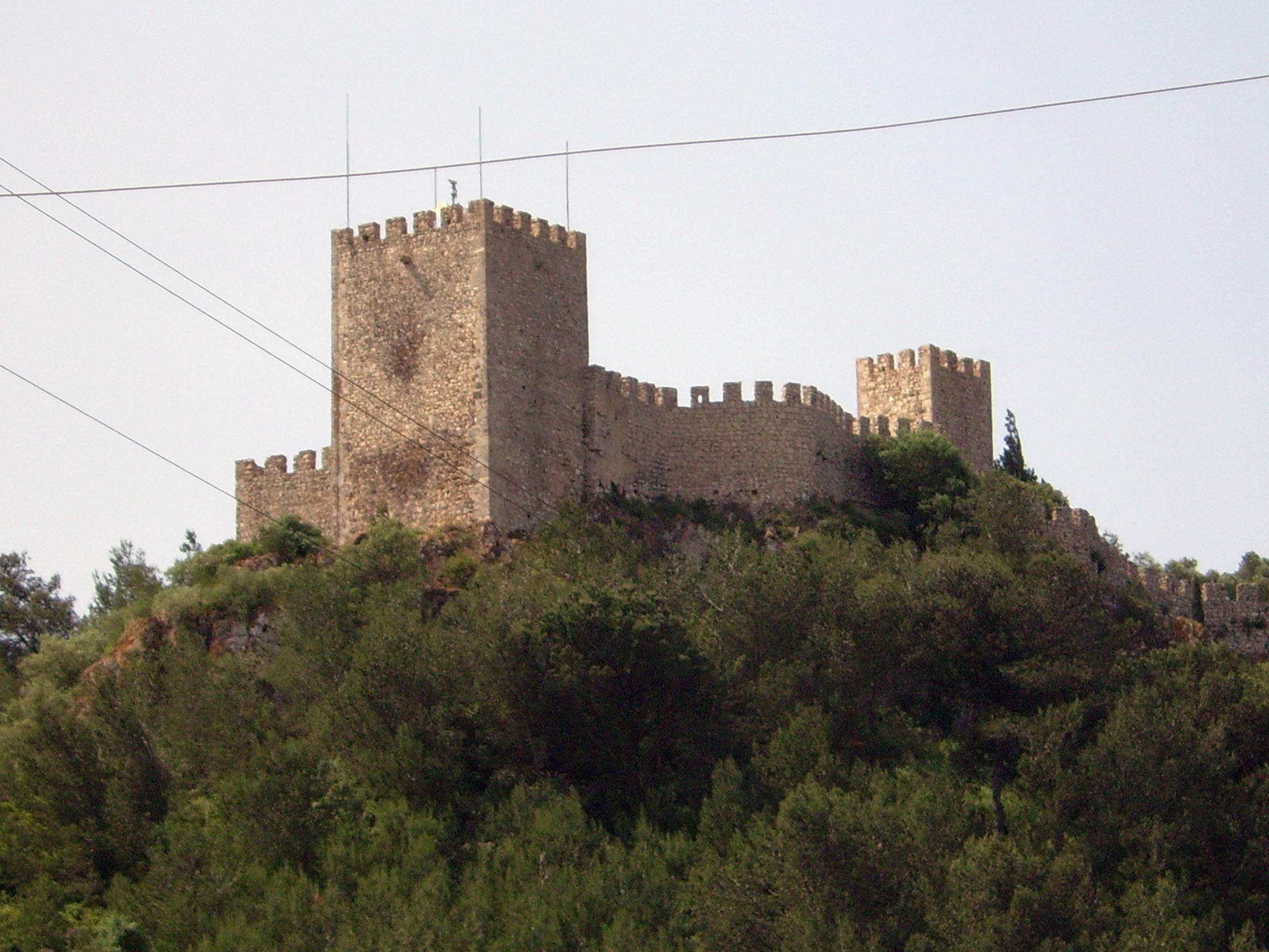 Castelo de Sesimbra - vista exterior 2006 Por Filipe ( user:sacavem)